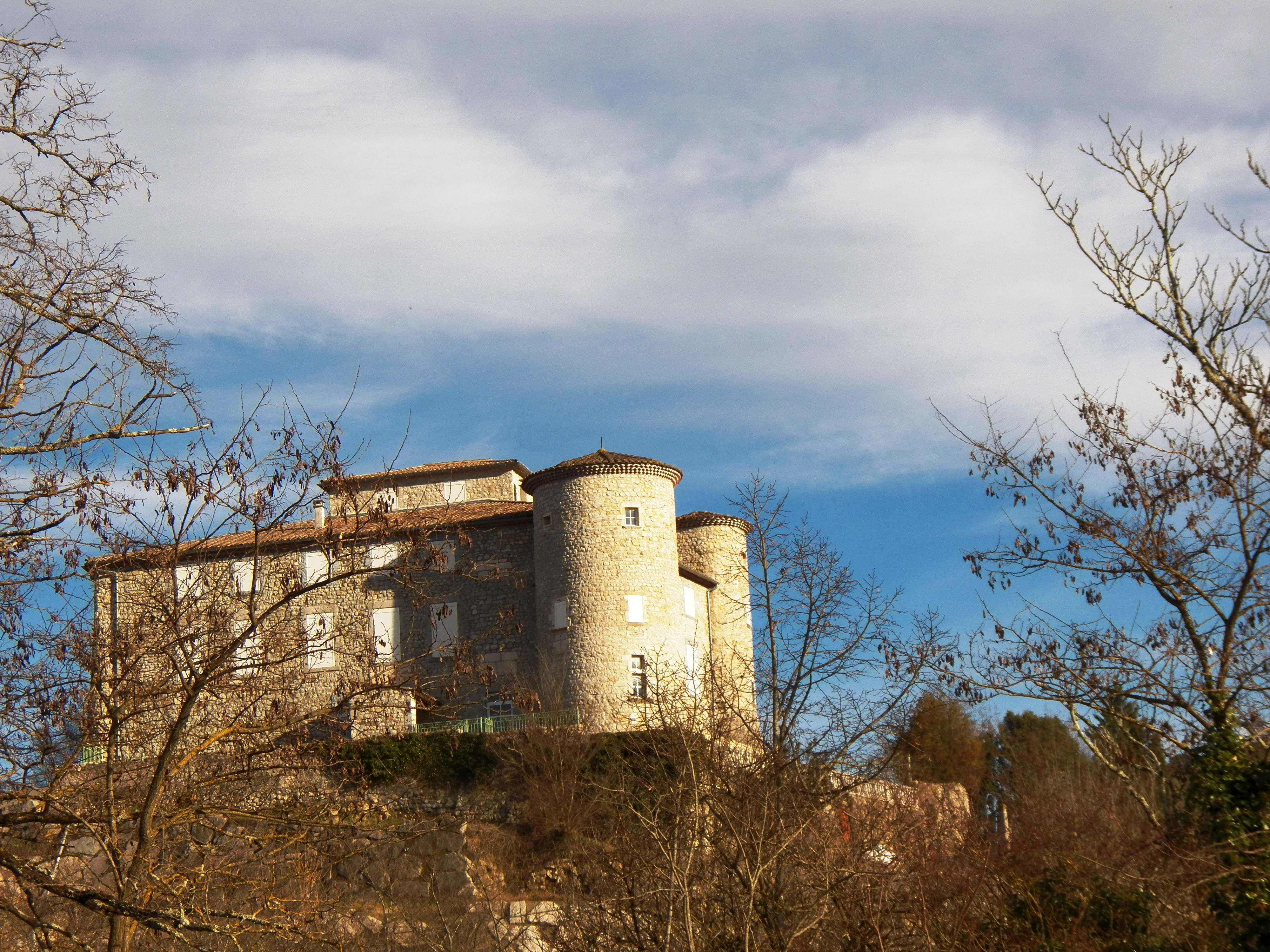 Château en Ardèche à proximité de Ruoms